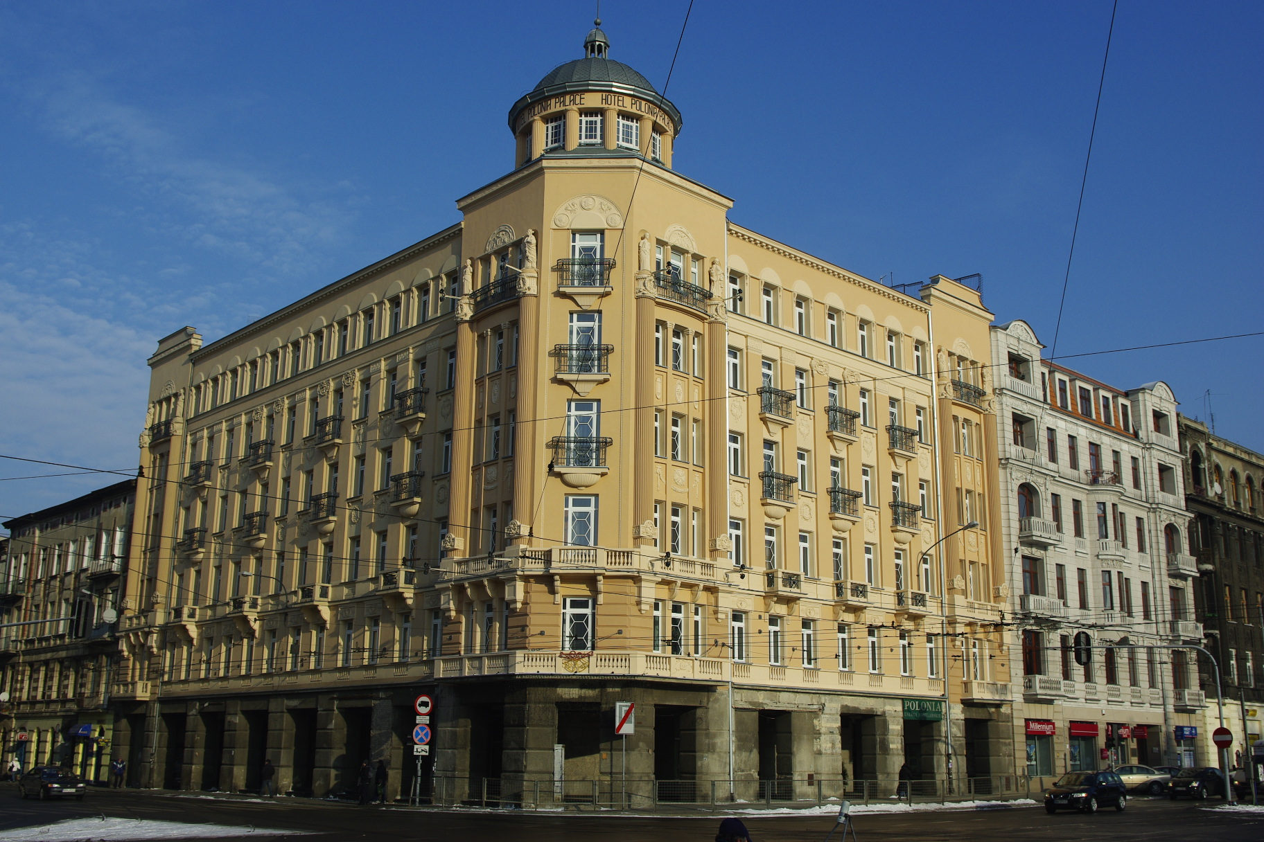 Hotel Polonia Palast w Łodzi